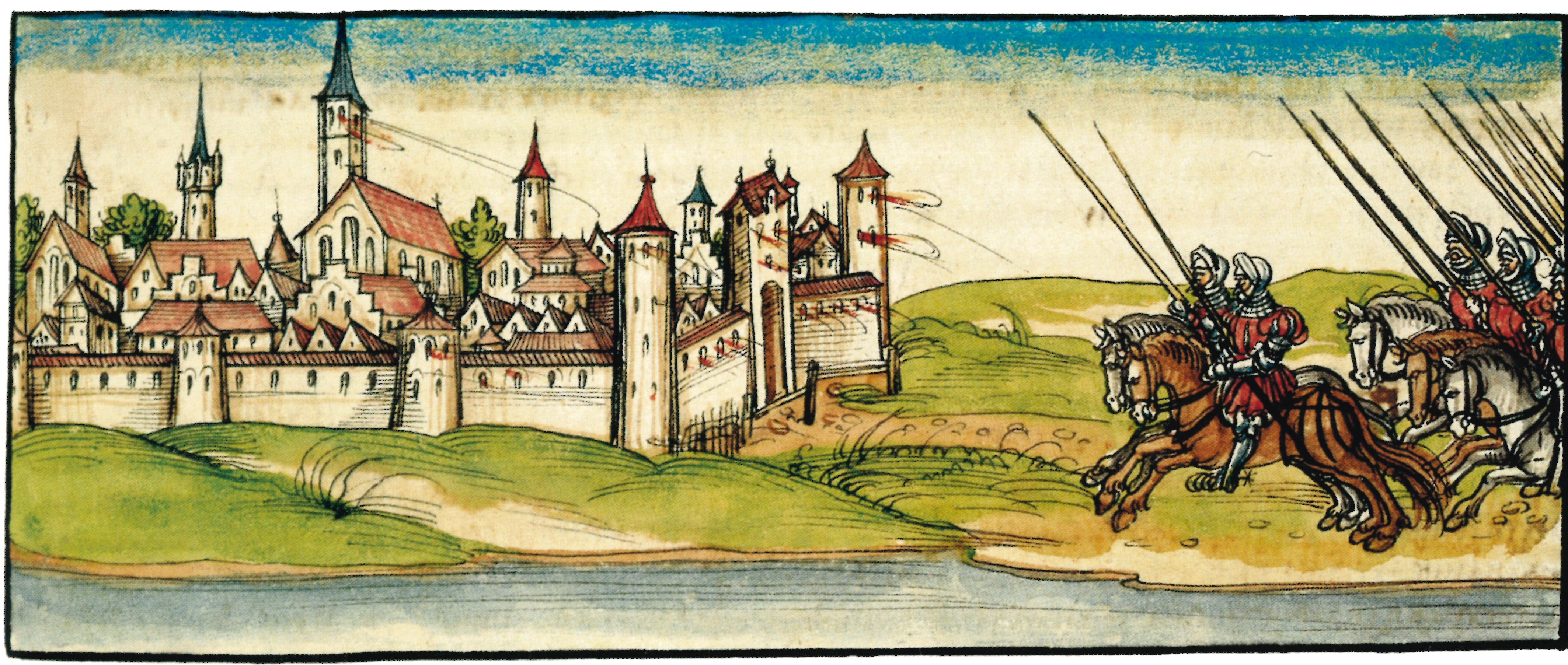 Lorenz Fries, Bischofschronik von Würzburg, Folio 225r Erkinger von Seinsheim überfällt Stadtschwarzach 1430